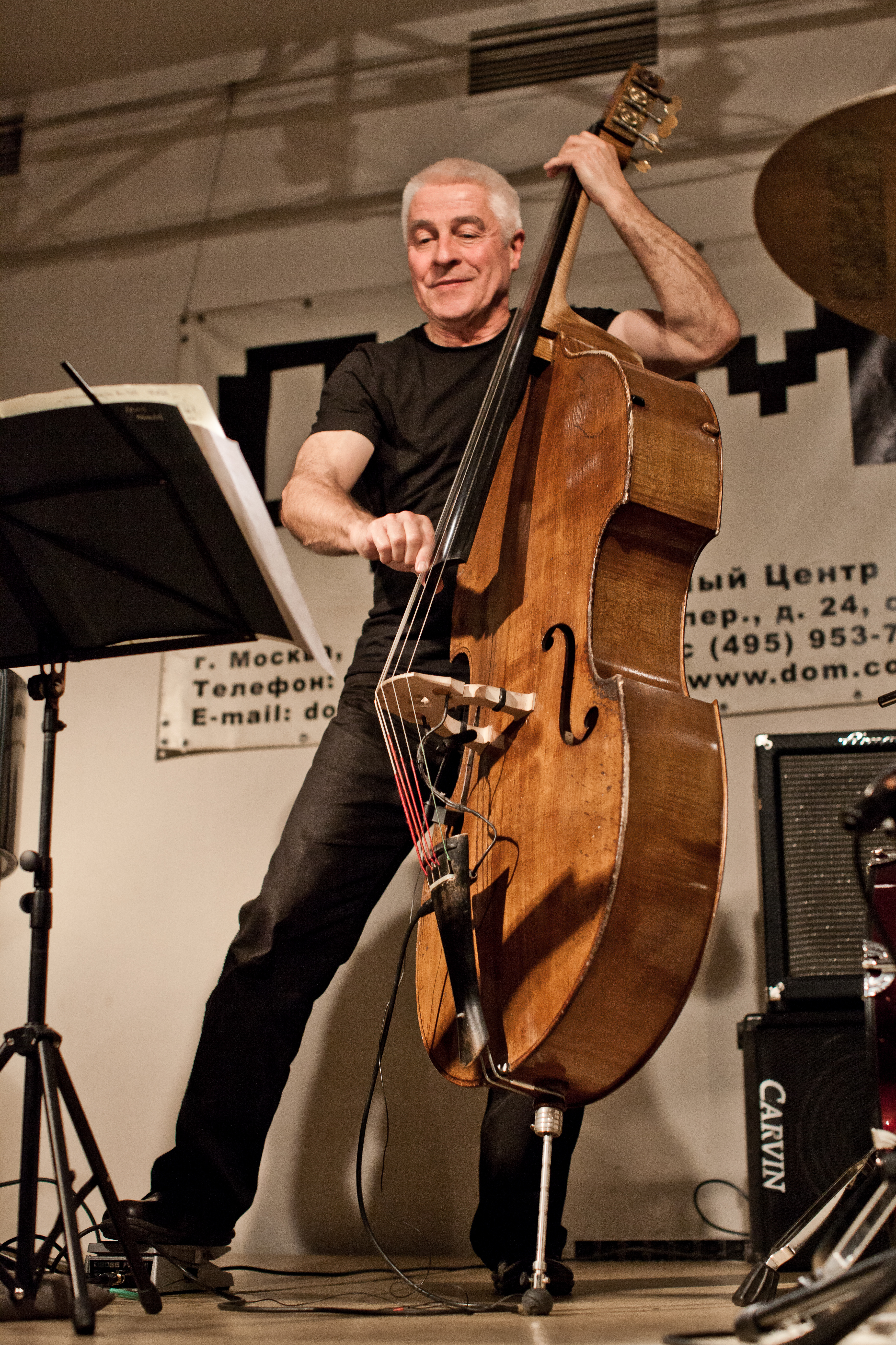 Aurora Trio (Barry Guy, Agustí Fernández, Ramon Lopez) in Moscow